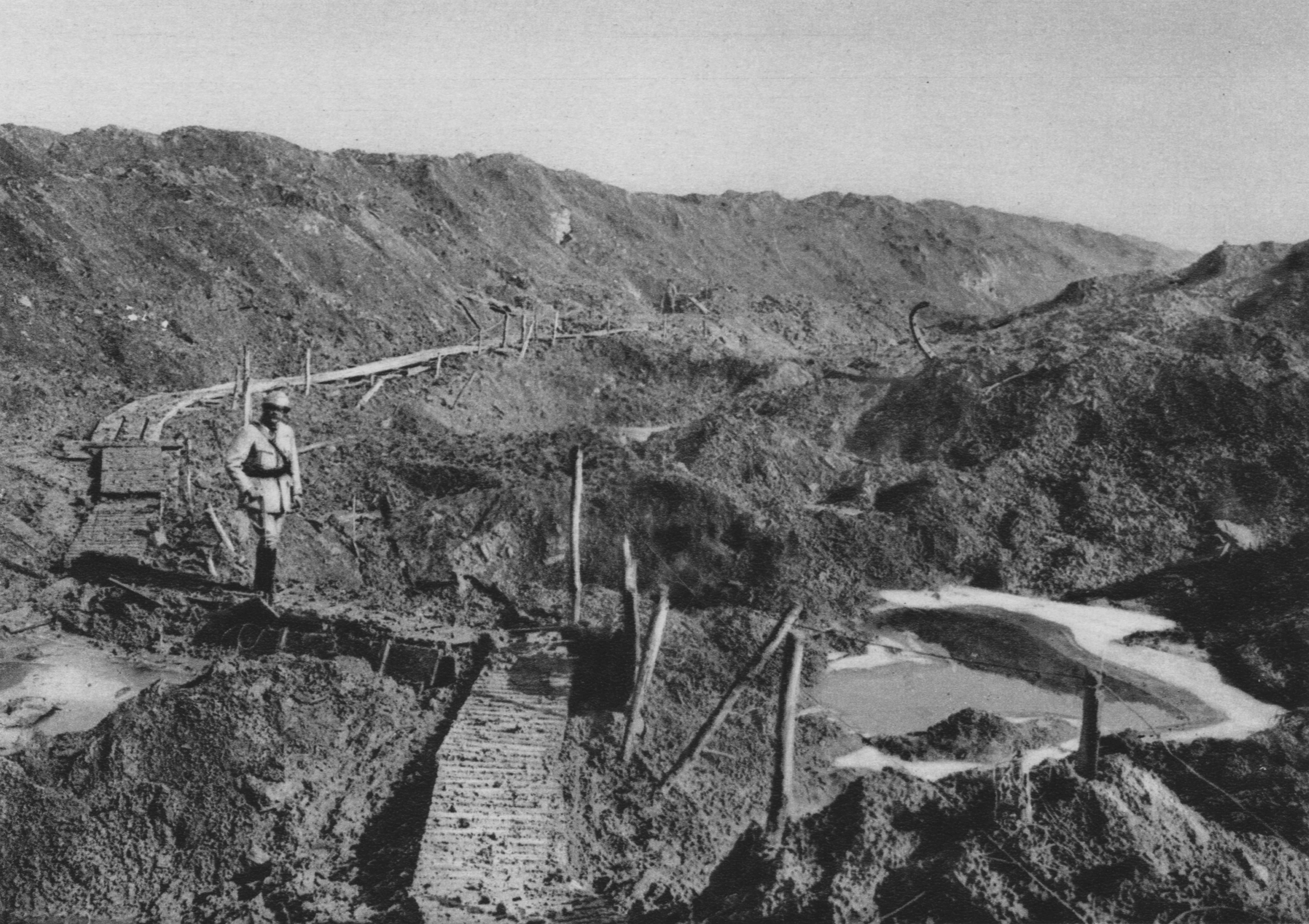 Im Trichterfeld des Forts Douaumont.